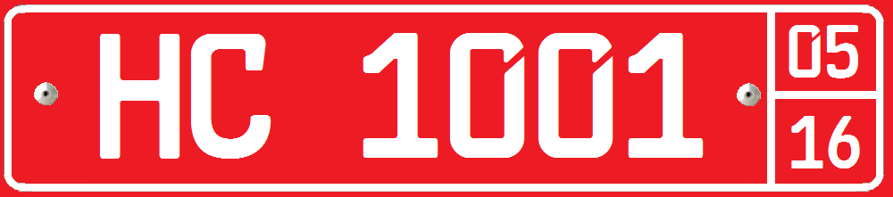 پلاک جدید جمهوری قرقیزستان